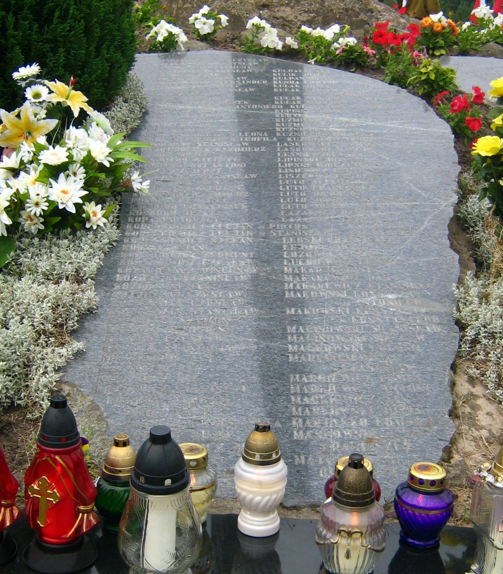 Tablica na wzgórzu w Gibach poświęcona ludziom, którzy zginęli podczas obławy augustowskiej. Na tablicach (a jest ich kilka) napisy zamordowanych osób.